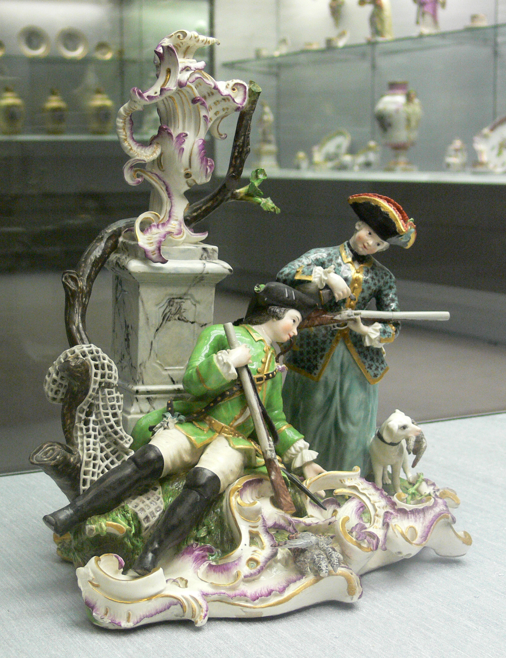 Johann Friedrich Lück: Jagdgruppe, Frankenthal um 1760 Kunstgewerbemuseum Berlin, Inv. Nr. HF 476